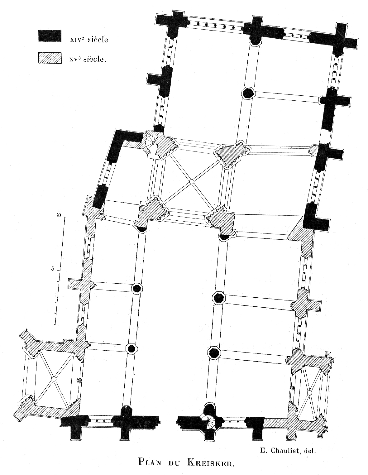 Plan de la chapelle N-D du Kreisker à Saint-Pol-de-Léon, avec les deux phases de constructions (XIVe et XVe siècles). Il permet de voir l'irrégularité de plan de l'édifice primitif : le chœur est fortement dévié vers le sud et le pignon nord du transept dévie dans la même direction, le pignon sud, sans être tout à fait parallèle au pignon nord, est cependant un peu oblique. Enfin la façade ouest est oblique par rapport à la nef. Ces anomalies peuvent s'expliquer en partie par des raisons topographiques : du côté nord on ne disposait que de peu d'espace suivant le tracé ancien de la rue Verderel bien que l'édifice fait encore une saillie sur l'alignement de cette rue. Une hypothèse associe une pensée symbolique (inclinaison du Christ) à ces circonstances.